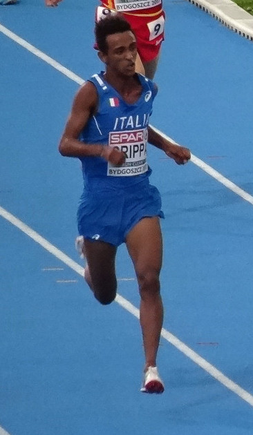 Młodzieżowe Mistrzostwa Europy w Lekkoatletyce U23 w Bydgoszczy 13-16 lipca 2017, bieg na 5000 m mężczyzn